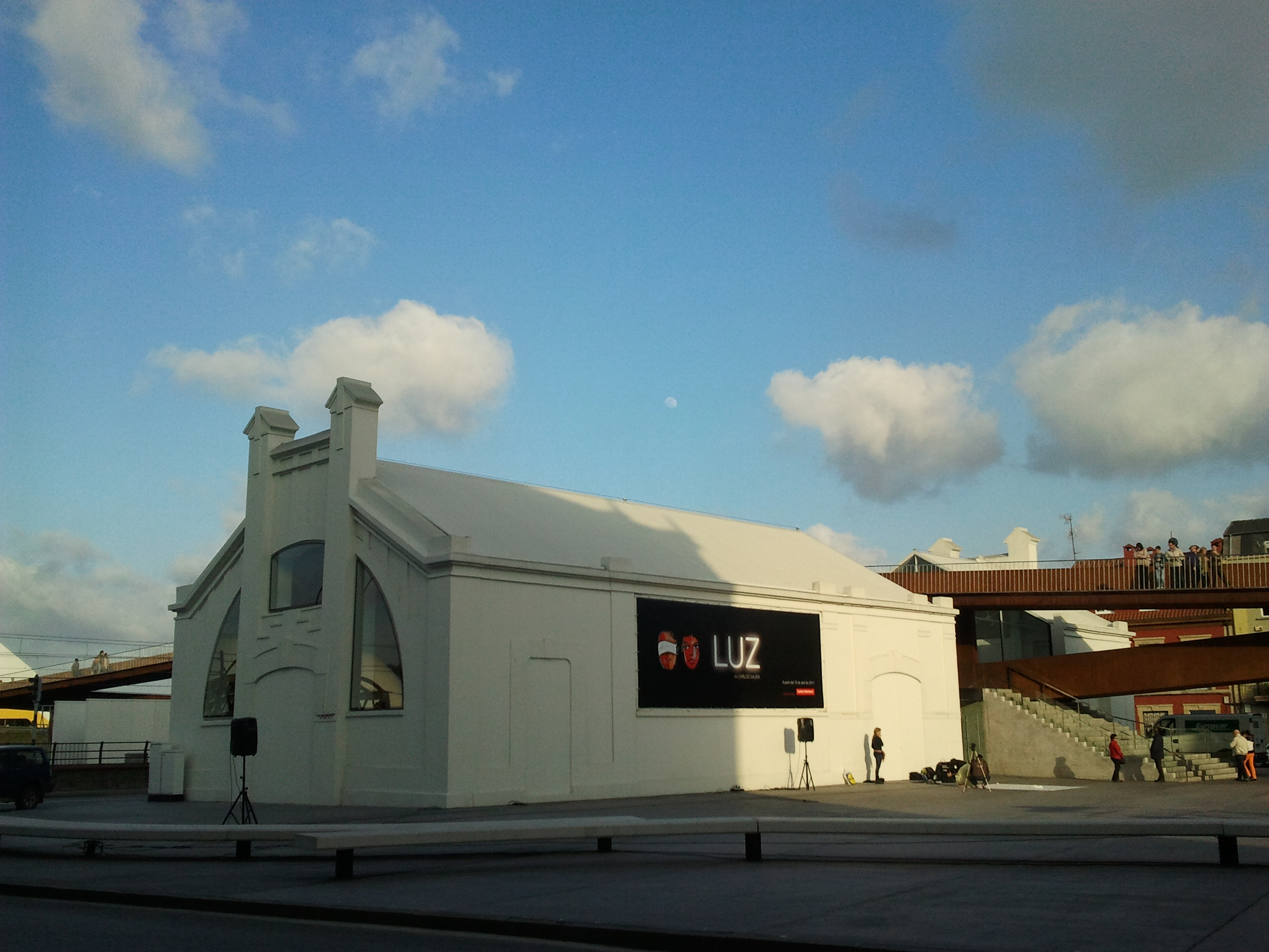 Centro Niemeyer - Recepcion de Visitantes